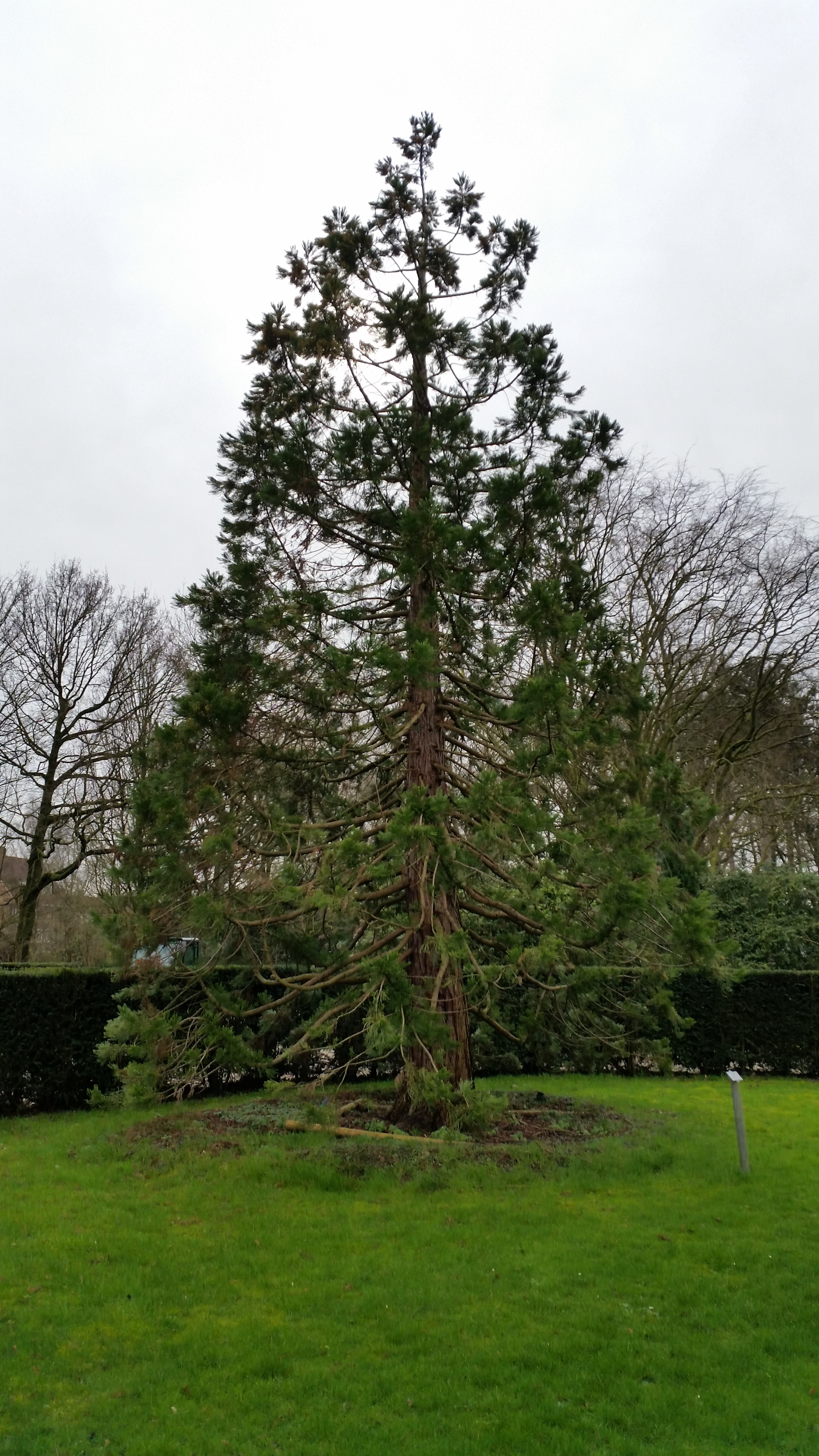 Herinnering aan kunstenares Micha de Ruwe in de vorm van een mammoetboom; De Nieuwe Ooster, Amsterdam-Oost (februari 2020)